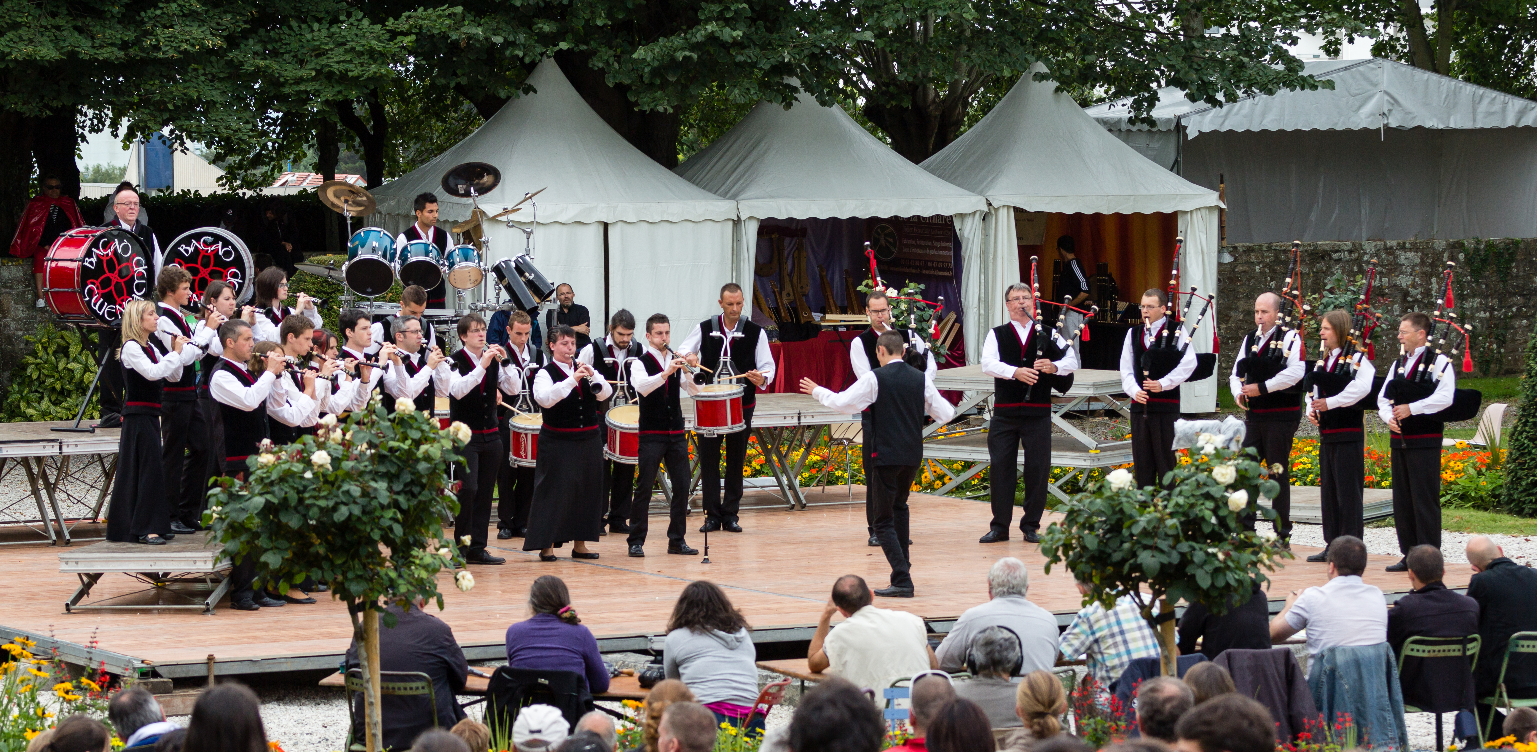 Le bagad Gwengamp lors du championnat national des bagadoù (deuxième catégorie) au FIL 2012.